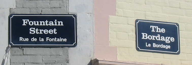 Street signs in St. Peter Port, Guernsey